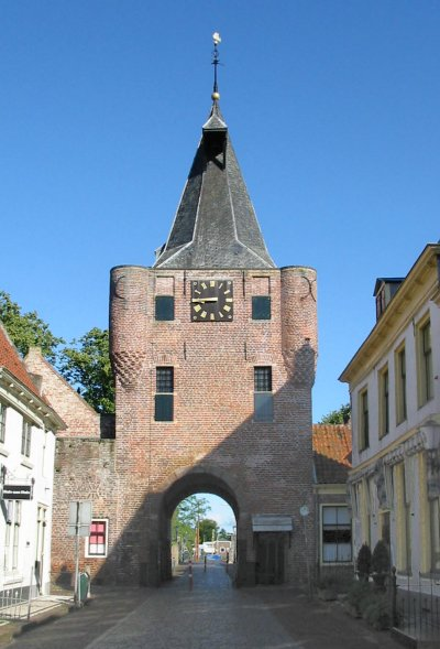 Stadspoort Elburg bij de haven (vischpoort). Eigen foto ter beschikking gesteld onder GFDL. Datum juli 2004